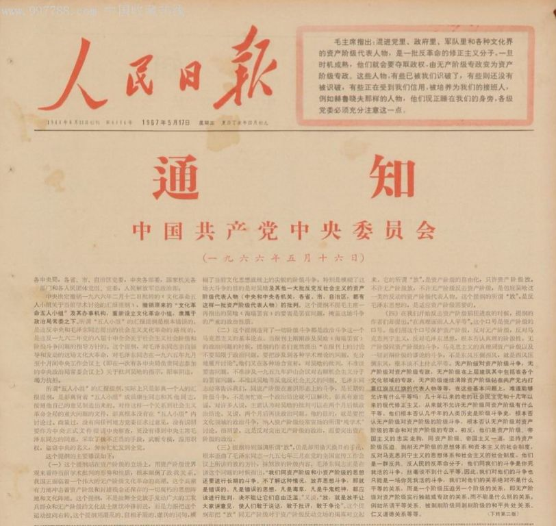 人民日报五·一六通知